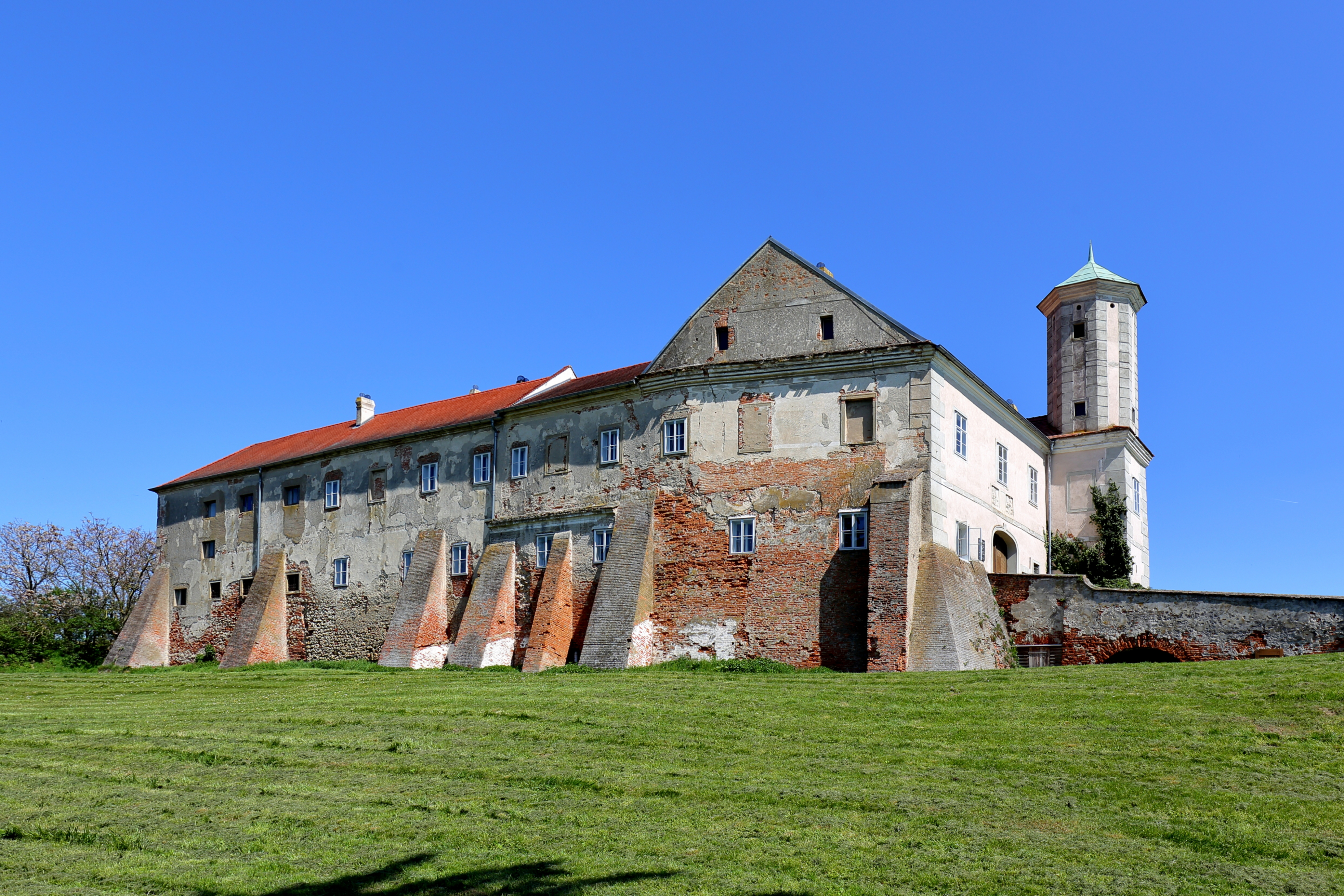 Westansicht des niederösterreichischen Schlosses Jedenspeigen im Bezirk Gänserndorf. Ein frühbarocker, vierflügeliger, zweigeschossiger Bau, der ursprünglich von einem Wallgraben umgeben war.